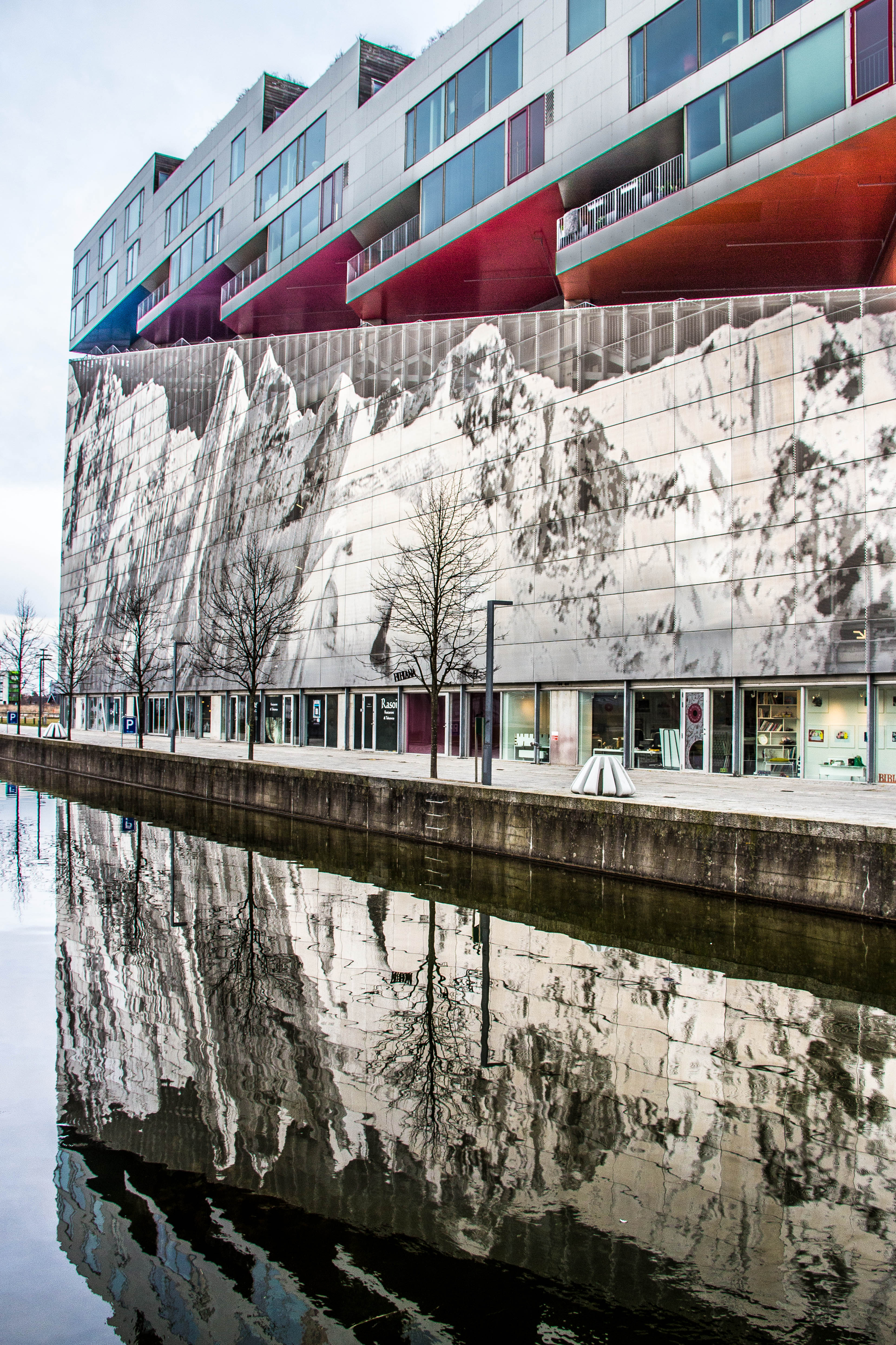 VM-Bjerget in Ørestad, Copenhagen, Denmark